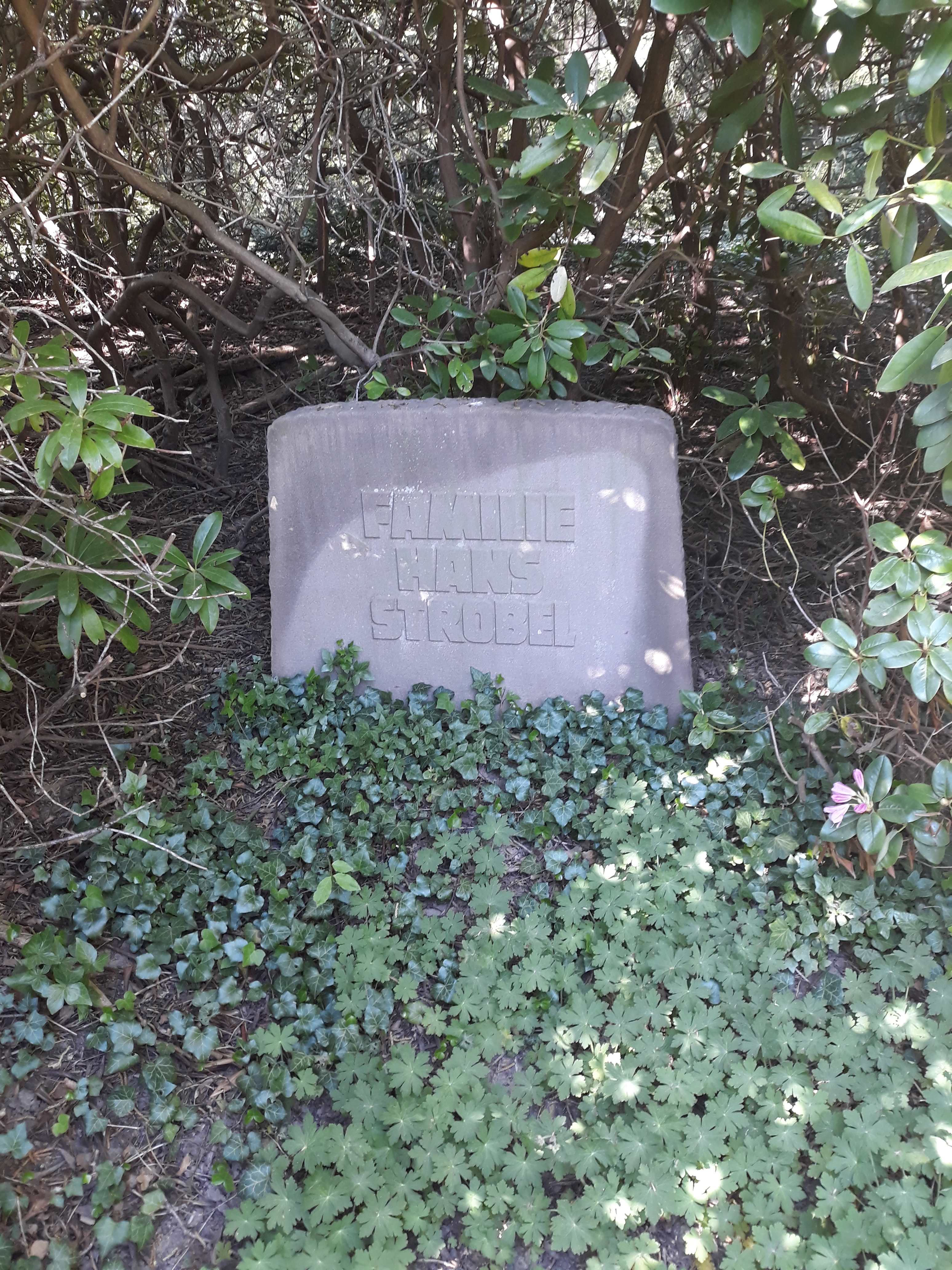 Das Grab des deutschen Architekten und Stadtbaumeisters Hans Strobel im Familiengrab auf dem Hauptfriedhof Dortmund.